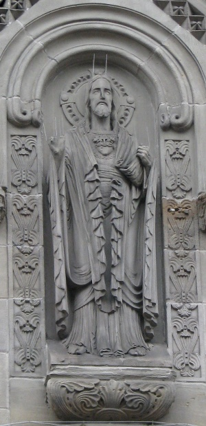 Herz-Jesu-Kirche in Mannheim-Neckarstadt-West.